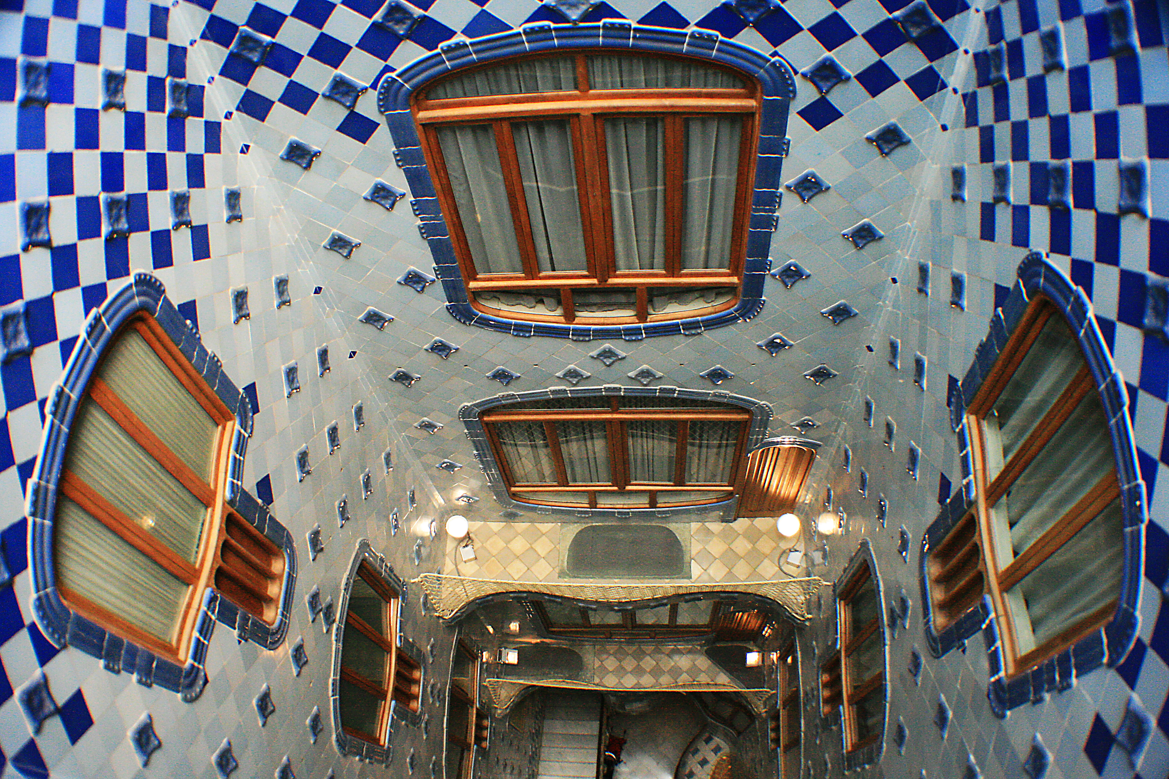 Note que a quantidade de azulejos azuis aumenta de acordo com a altura nas paredes. Como se o mar fosse ficando mais profundo e escuro.